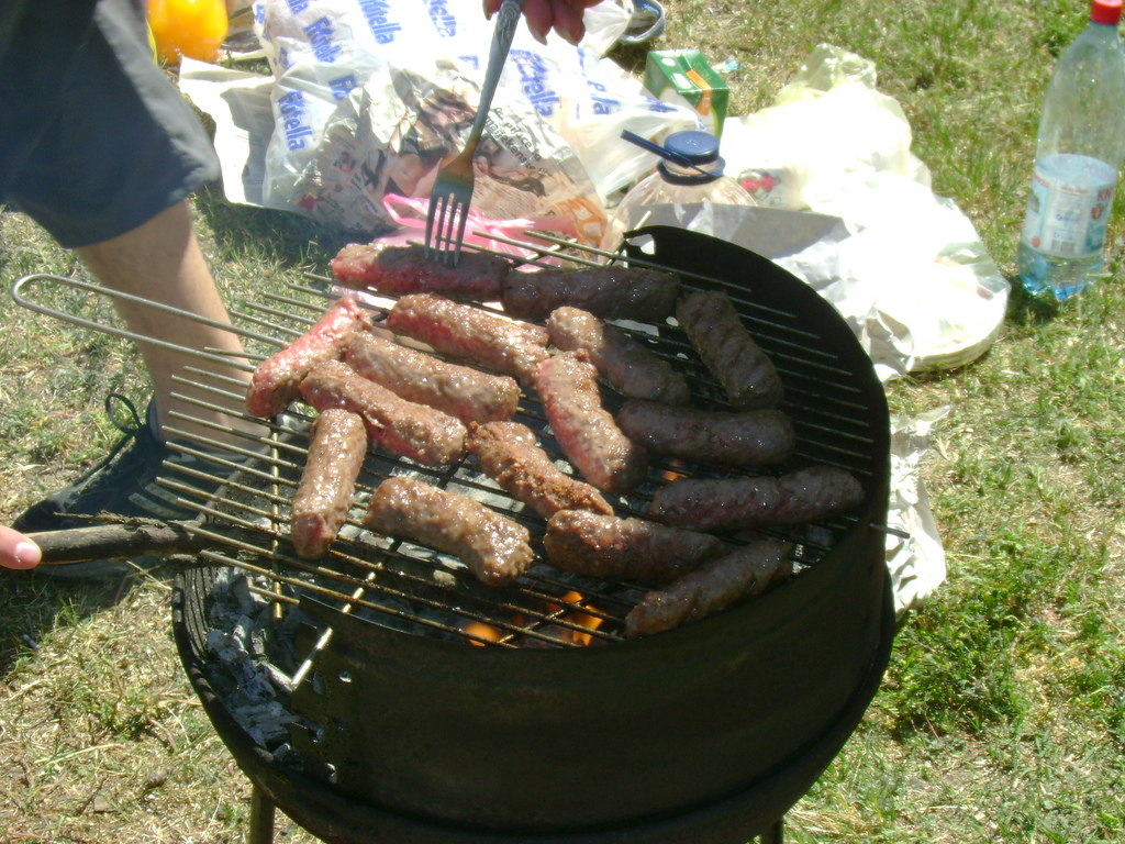 Ćevapčići preparation.